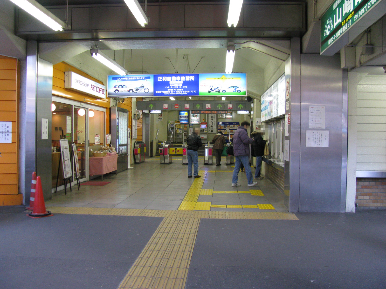 京成電鉄堀切菖蒲園駅